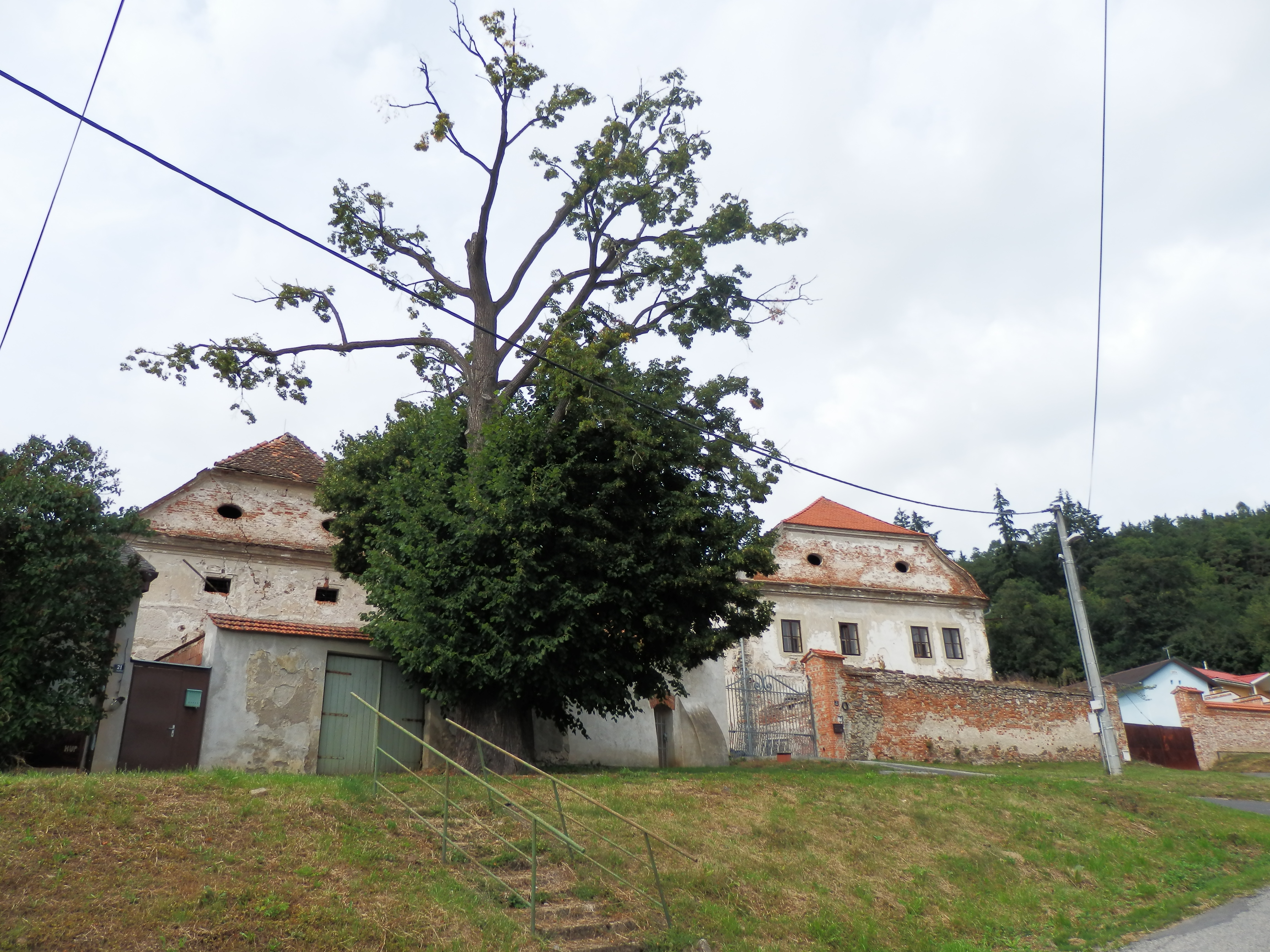 zámek (Vohančice), Vohančice 7